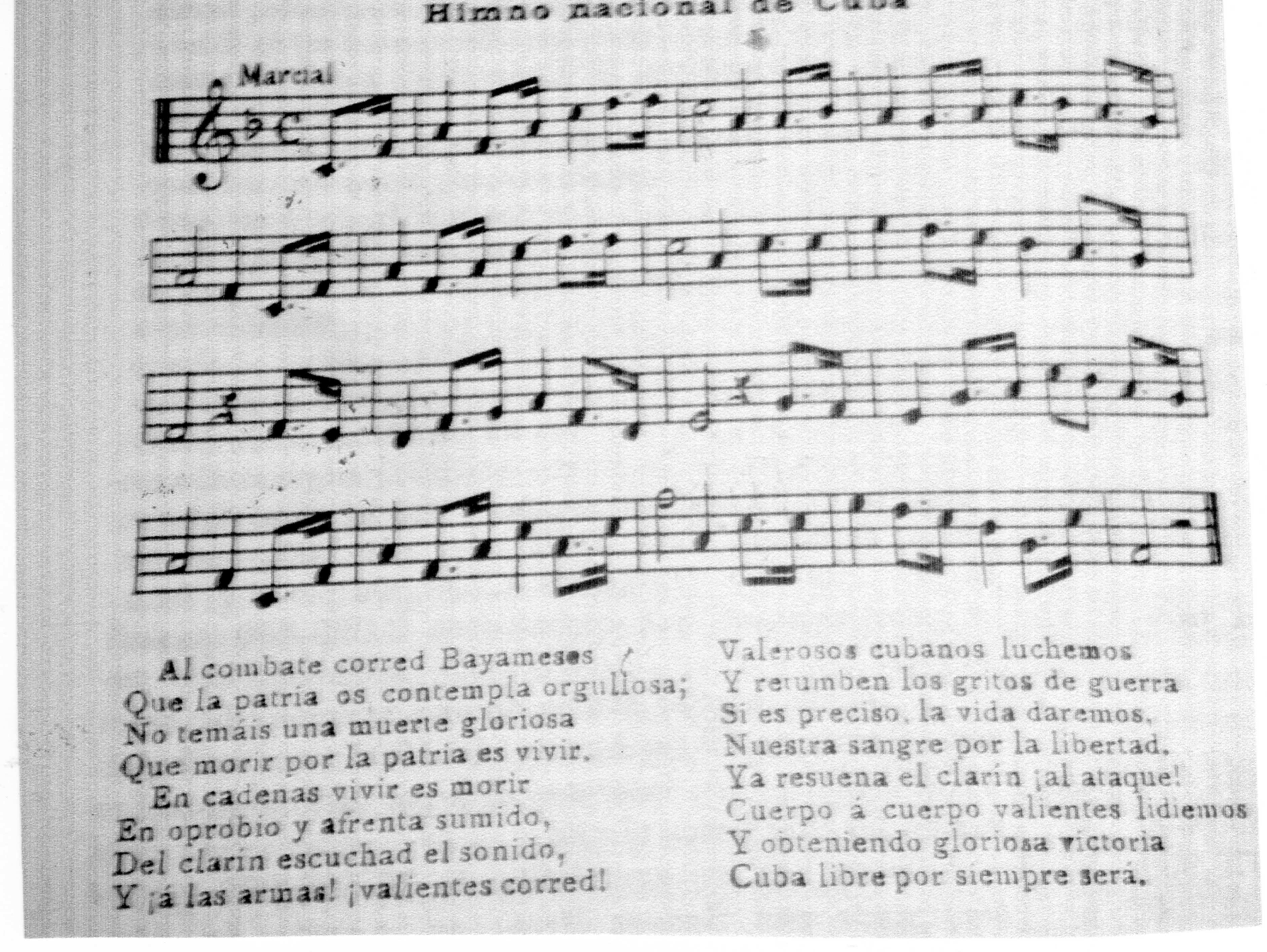 Partitura i lletra de l'himne de Cuba